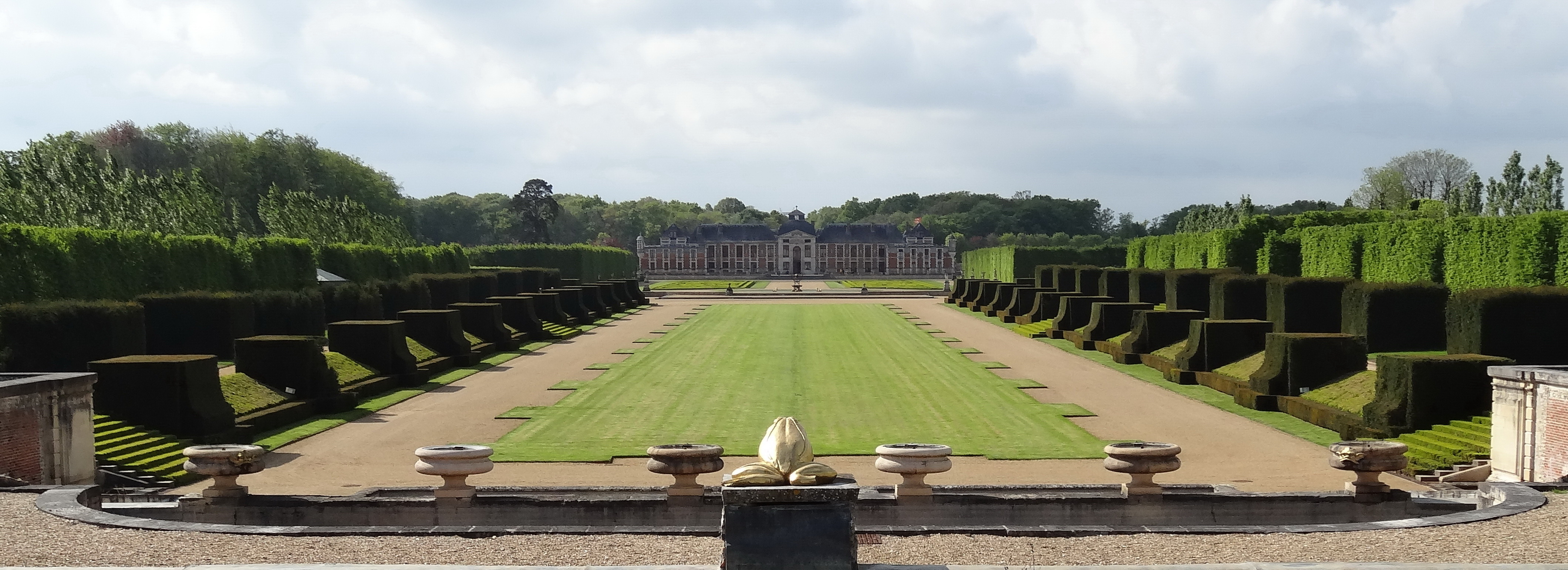 Château du Champ de Bataille - La Voie